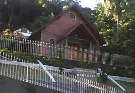 Templo da Igreja Cristã Maranata no Rio de Janeiro.